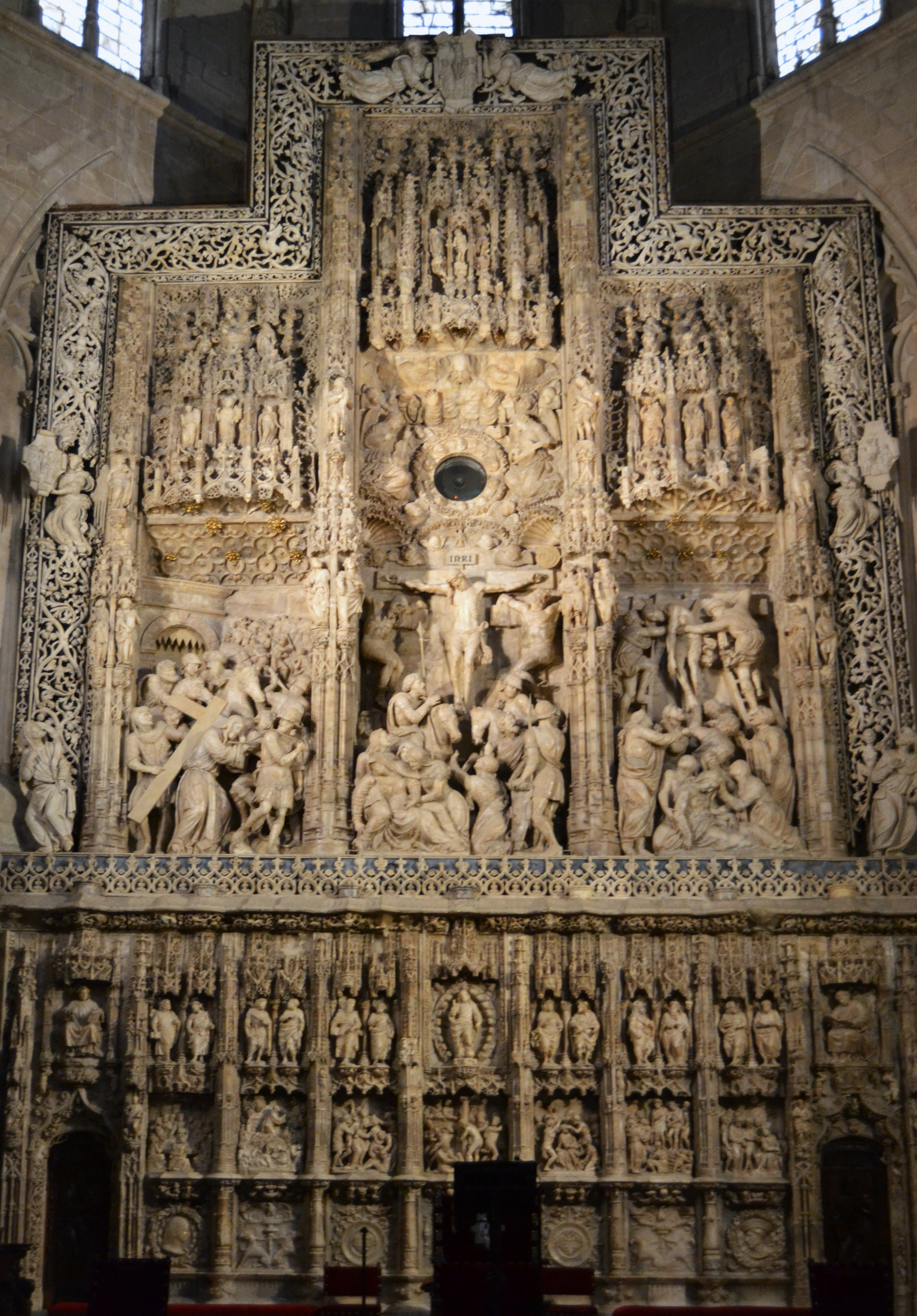 Altar major de la catedral d'Osca, dedicat a Jesús Natzaré, titular de la catedral junt a sant Pere. Encarregat pel bisbe Joan d'Aragó i Navarra a l'escultor valencià Damià Forment, qui el va realitzar entre 1520 i 1533. Alabastre, estil gòtic en la decoració i renaixentista en els grups escultòrics i relleus.